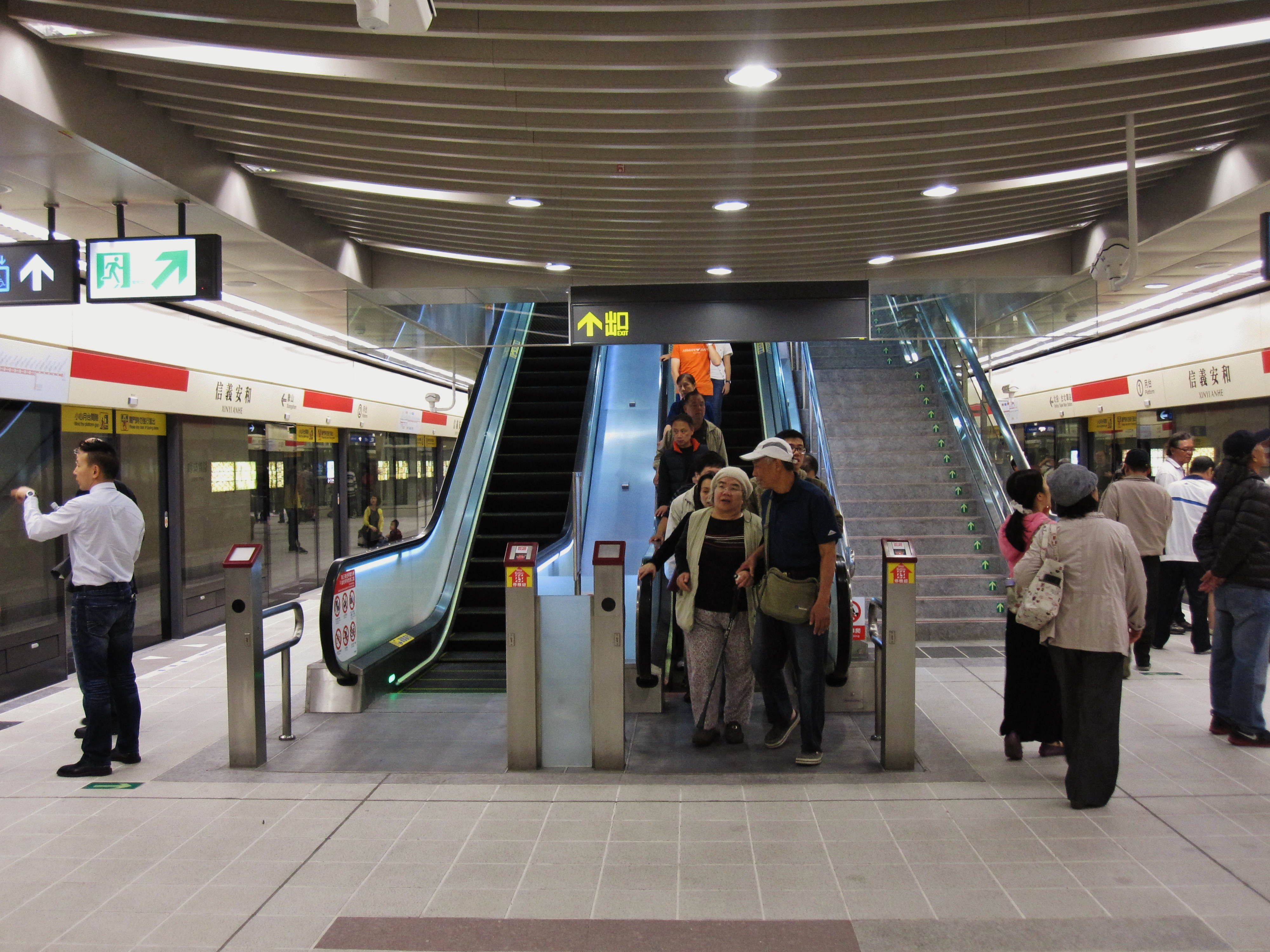 台北捷運信義安和站月台層。